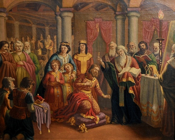 Покръстване на Преславския двор